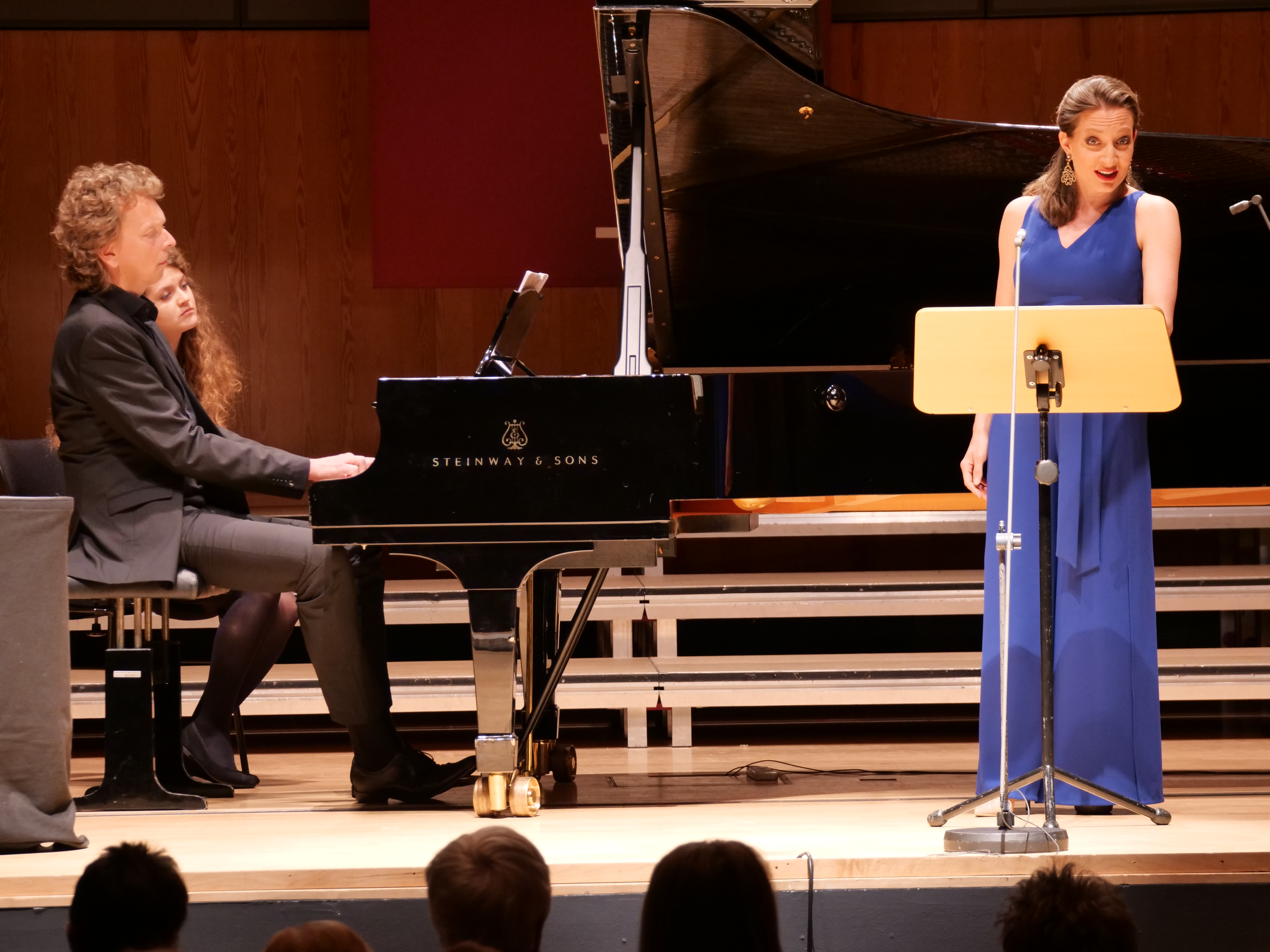 Thomas Quasthoff (Lesung), Justus Zeyen (Klavier) & Christiane Karg (Sopran) beim Meisterkonzert am 14.05.2019 im Konzerthaus der HfM Detmold. CC BY-SA 4.0